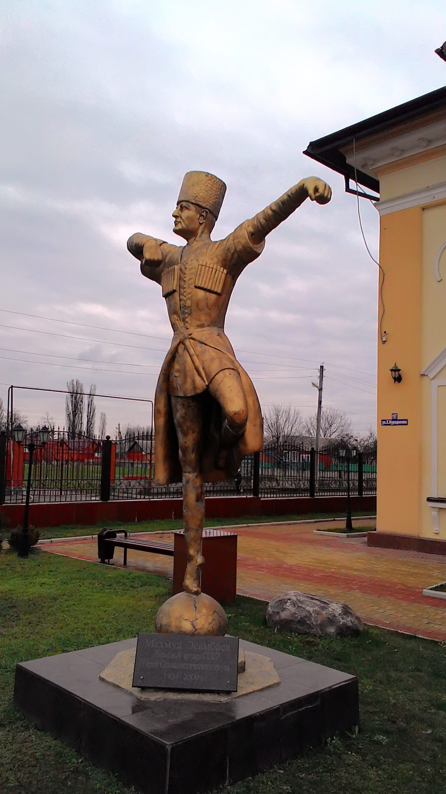 Дом культуры в селе Старые Атаги